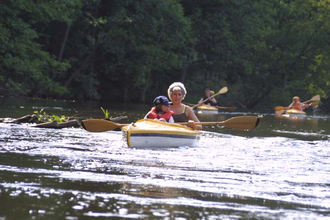 Rzeka Wda.